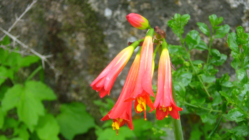 Añañuca de dos colores, Azucena del diablo. Bulbo globoso, 5 cm diametro, tunicado, café oscuro, cuello de 2,5 a 5 cm. de long. hojas alrededor de 4, contemporáneas con las flores, lineares, obtusas 46 a 60 cm de long., alrededor de 1,3 cm de ancho, delgadas en la base, pedúnculo delgado de 30 a 46 cm de largo; umbela de 4 a 9 flores; espata--valvas lanceoladas 2,5 a 3,8 cm de long.; pedicelos delgados, tan largos como la espata, flores ascendentes?, con forma de embudo angosto de 3,8 a 5 cm de largo, rojo brillante pasando a amarillo verdoso hacia la base; tubo corto con forma de embudo, con paraperigonio de 6 diminutas dientes hacia la garganta; tepalos oblanceolados, con una larga uña connivente de 9 mm de ancho en el extremo; estambres desiguales, declinantes, similar en longitud a los tepalos; estilo exerto; estigma capitado. Especie relativamente común en los áreas bien conservadas de bosque esclerófilo costero e interior, crece preferentemente bajo dosel, pero se puede observar creciendo expuestas al sol incluso en exposiciones norte. Es una de las primeras geófitas en florecer a partir del mes de julio-agosto. Embalse los Aromos, Región de Valparaiso.